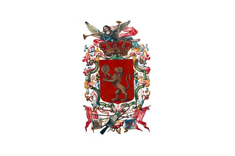 Bandera Municipal de Yepes (Toledo)